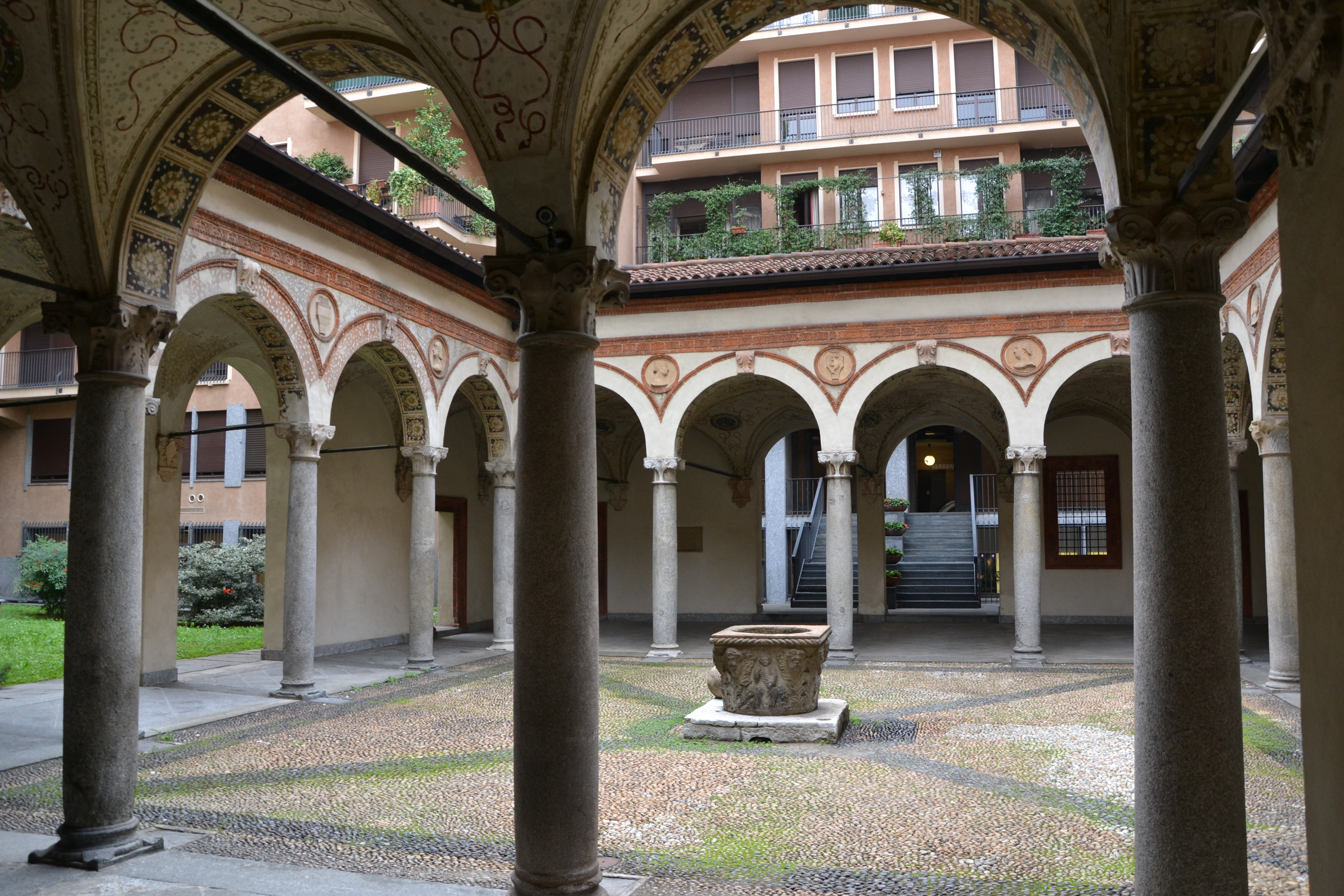 Corte, Palazzo Dal Verme a Milano (XV sec) via Puccini.